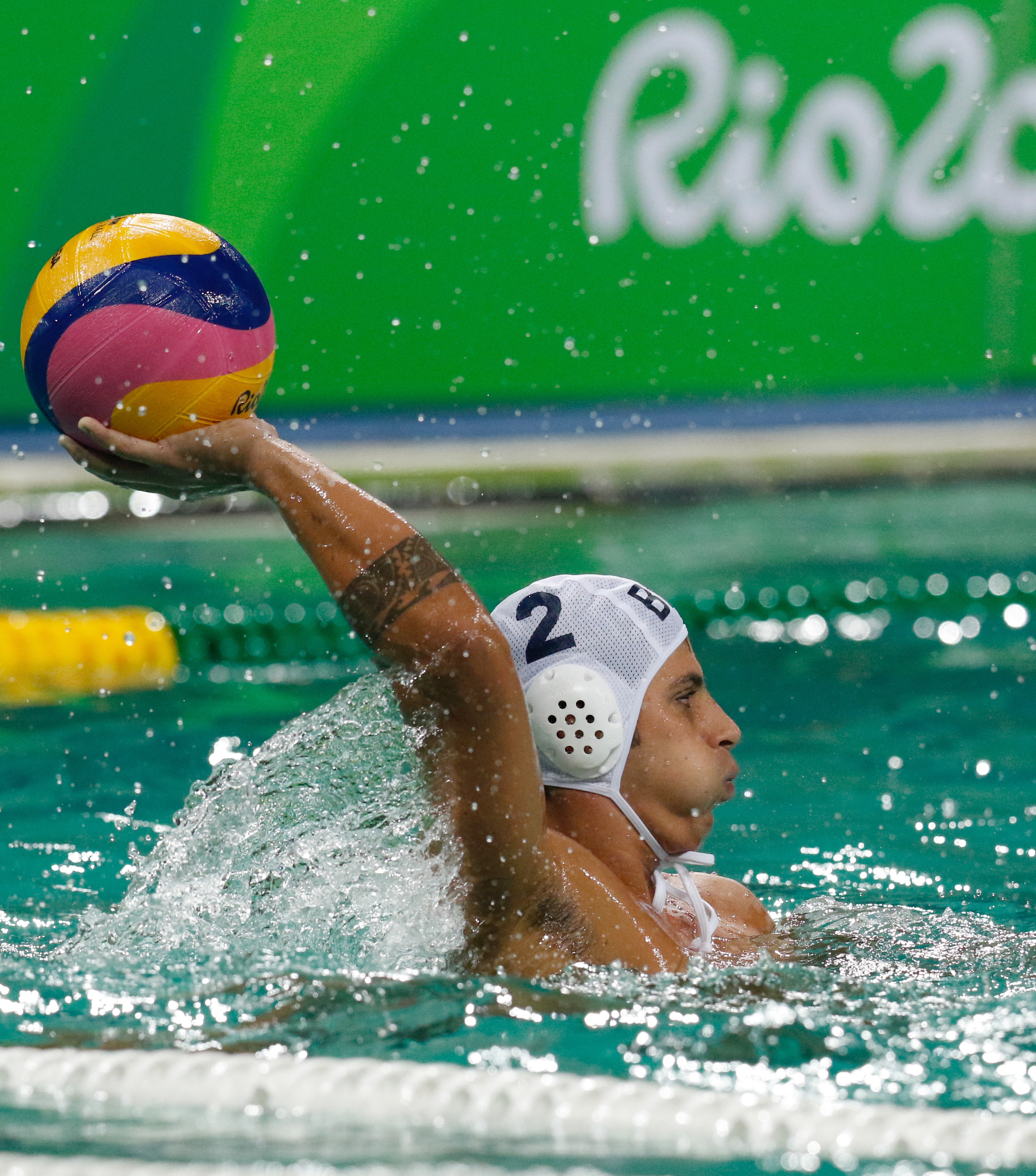 Rio de Janeiro - Seleção masculina brasileira de polo aquático vence a da Sérvia por 6 a 5 nos Jogos Olímpicos Rio 2016, no Parque Aquático Maria Lenk (Fernando Frazão/Agência Brasil)